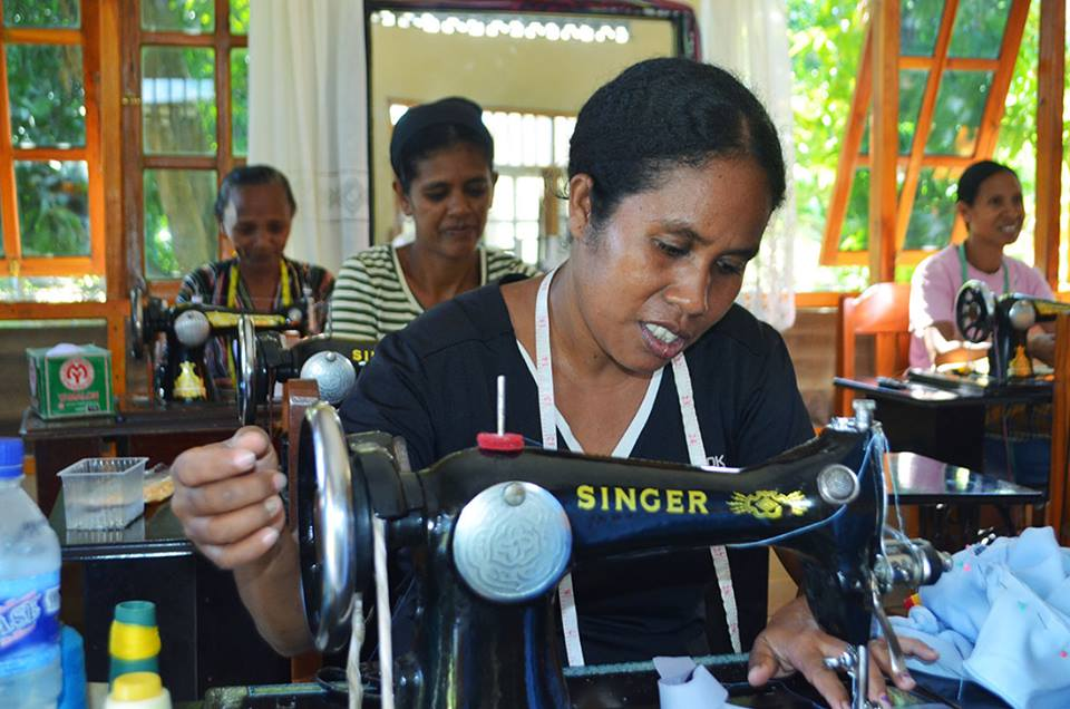 Tetun: Kolejiu Irmas Missionarias Dominikanas Padiae, Lalisuc, Timor-Leste